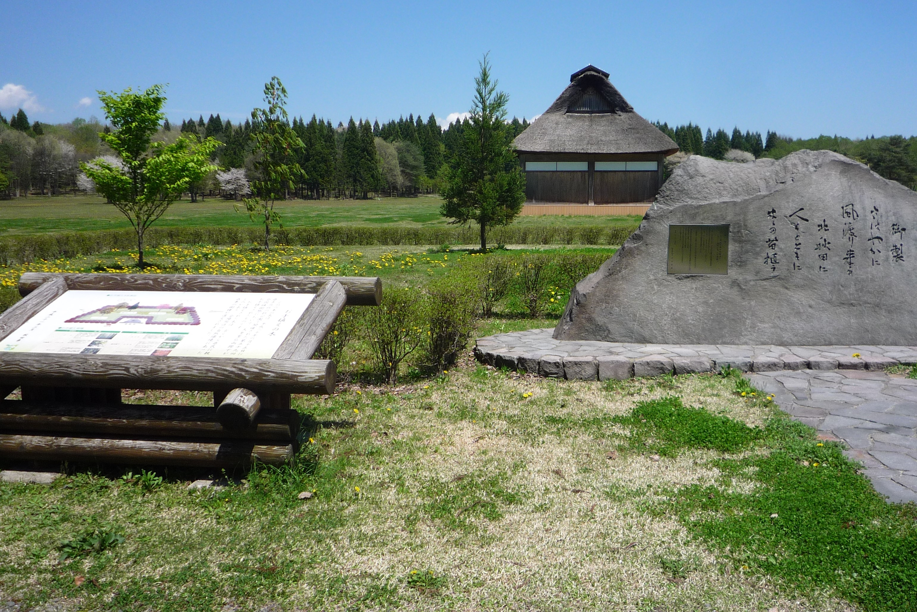 北欧の杜公園 全国植樹祭式典開催地